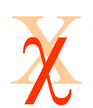 Greek letter